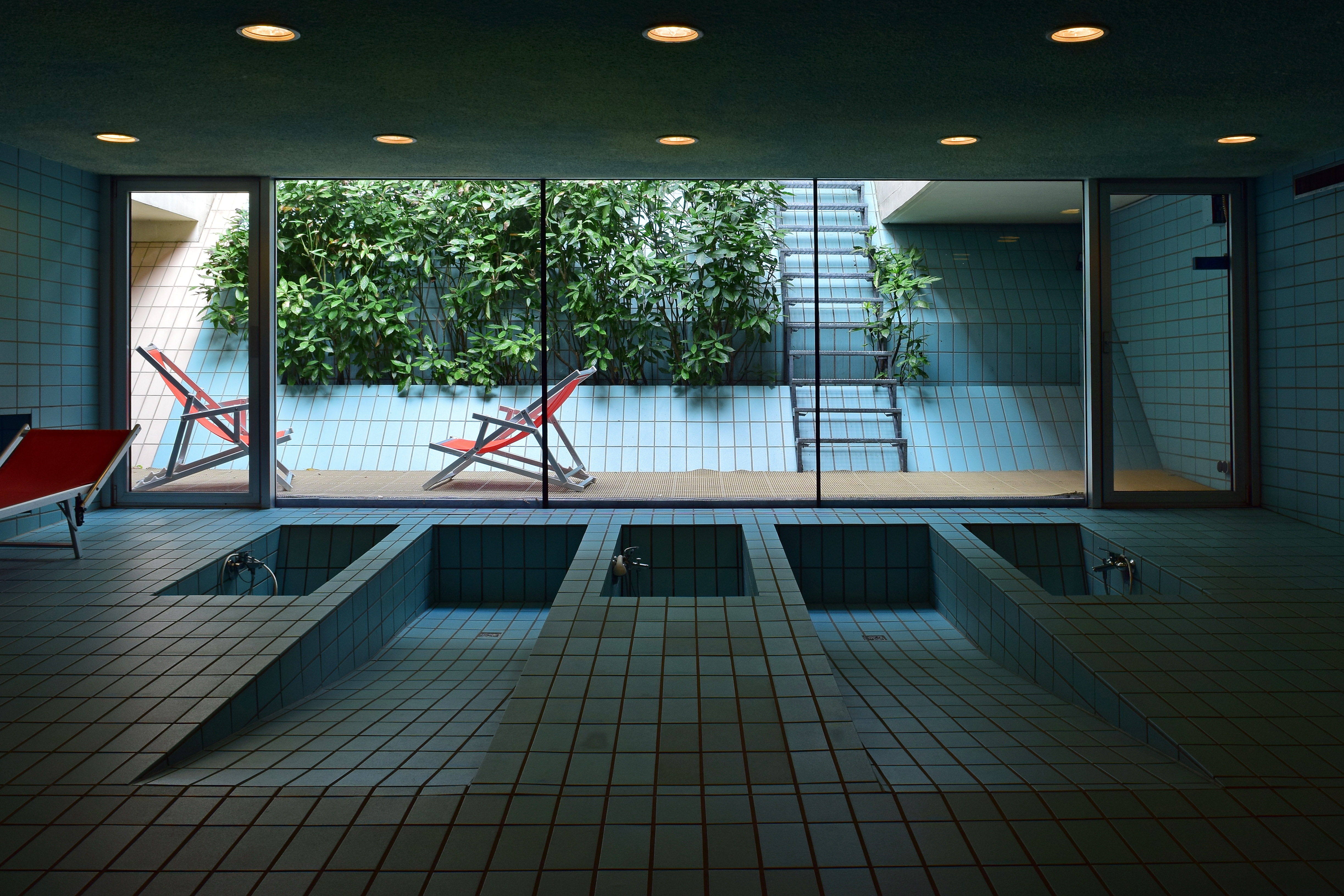 In der ehemaligen Sargfabrik in Wien-Penzing verwirklichte der Verein für Integrative Lebensgestaltung im Jahr 1996 ein Wohn- und Kulturprojekt. Darin befinden sich neben Wohnungen ein Kulturhaus, ein Badehaus, ein Seminarraum, ein Kinderhaus und ein Café-Restaurant. Näheres in diesem PDF.